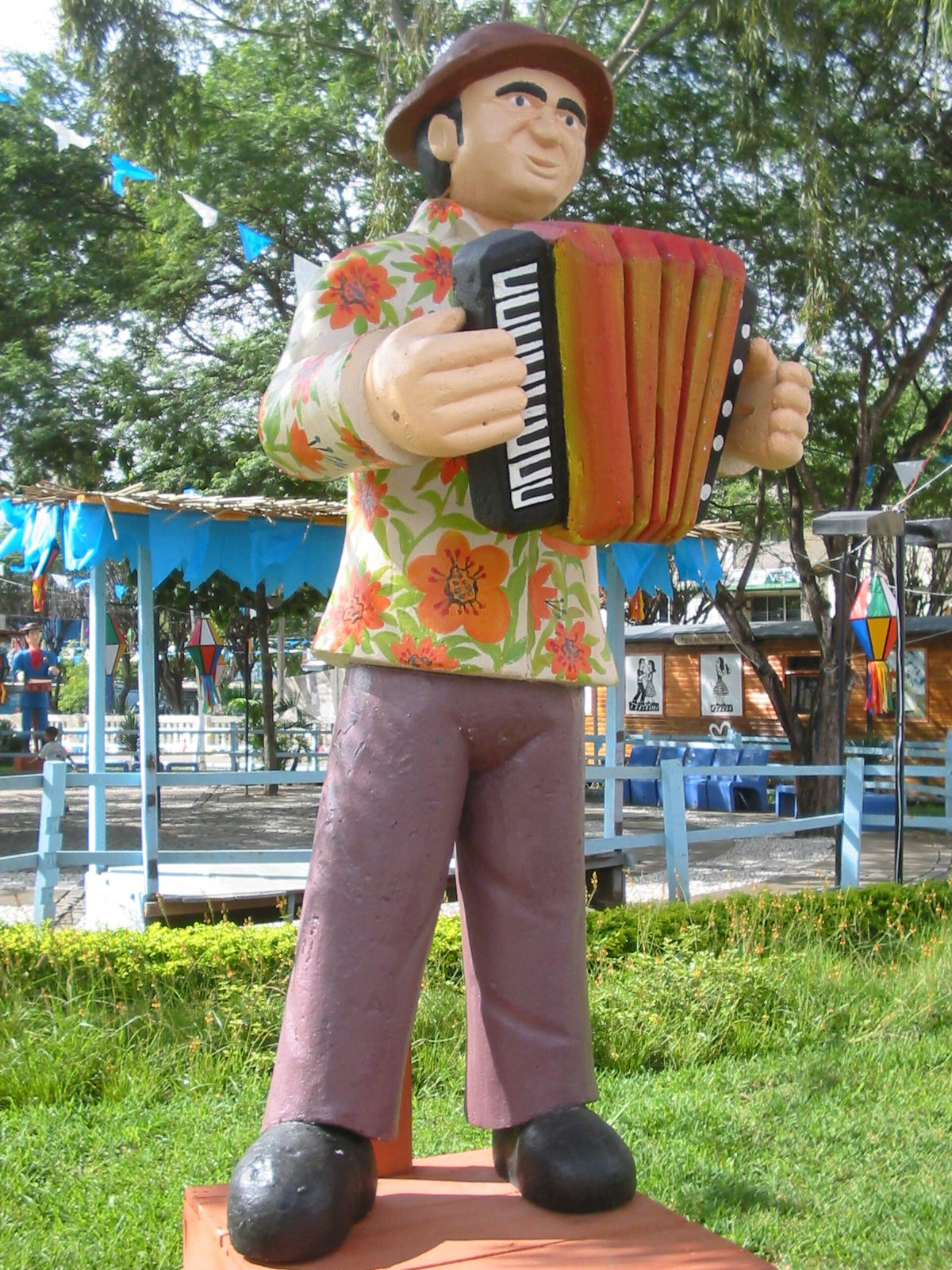 Caruaru (Pernambuco), Brasil. Figura de barro de um sanfoneiro. São João 2005. Caruaru (Pernambuco), Brazil. Sculpture of a musician.